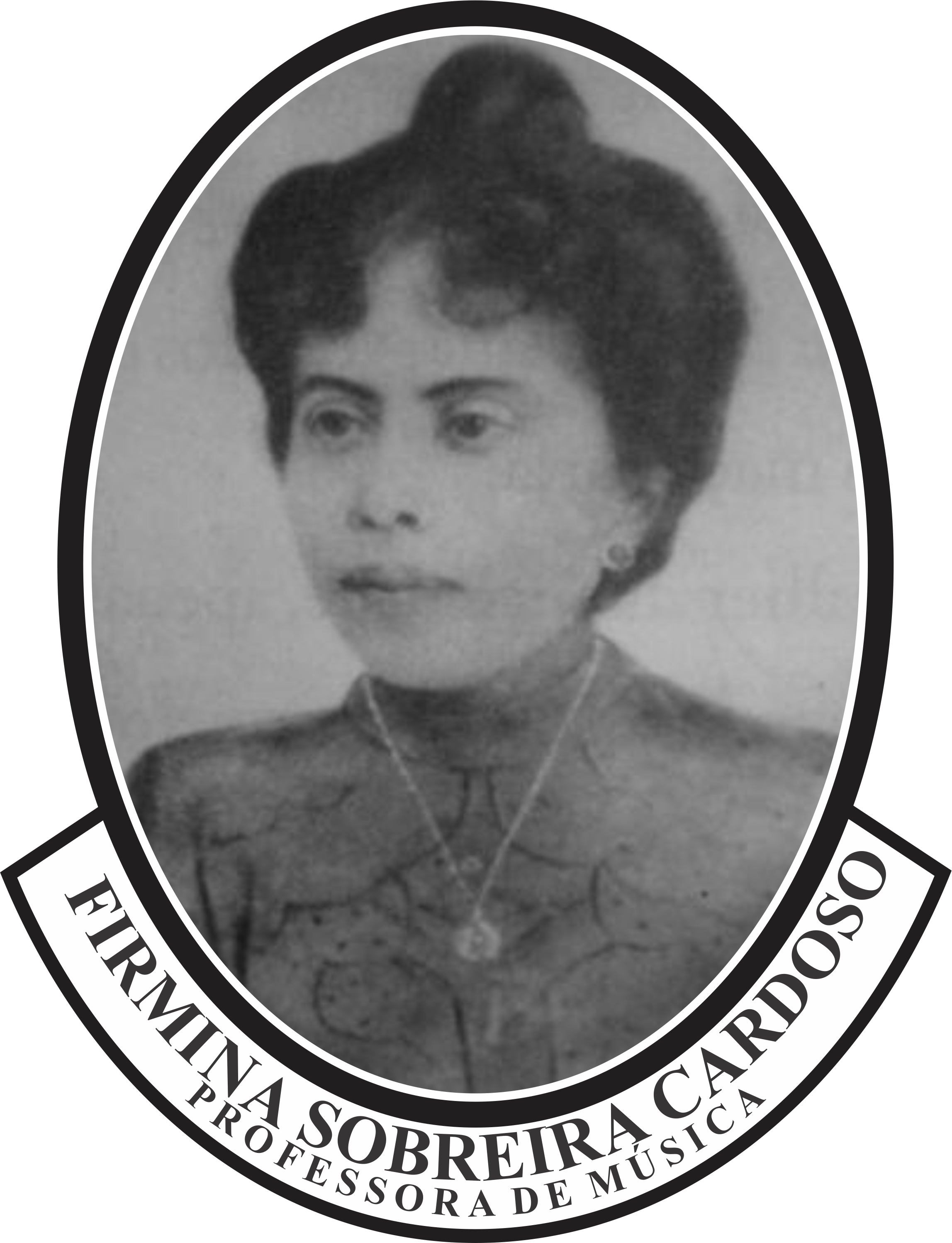 Medalhão oval com retrato bustal da professora Firmina Sobreira Cardoso como professora de música da Escola Normal do Piauí, atual Instituto de Educação Antonino Freire. Ela foi uma das autoras da música do Hino do Piauí.